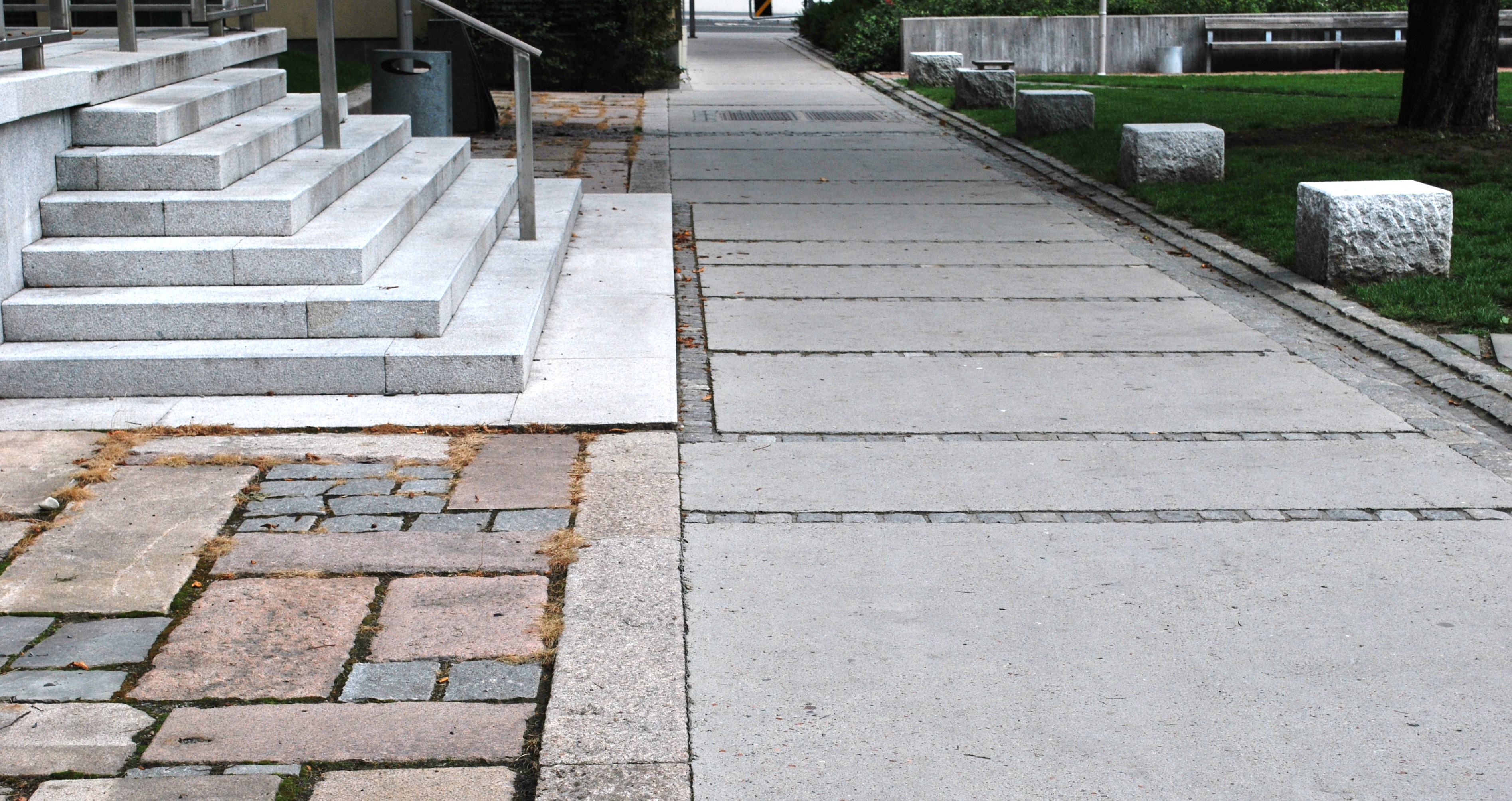 Sentralparken, Pilestredet park, Oslo. Gjenbrukt granitt og knust betong som plassgulv.